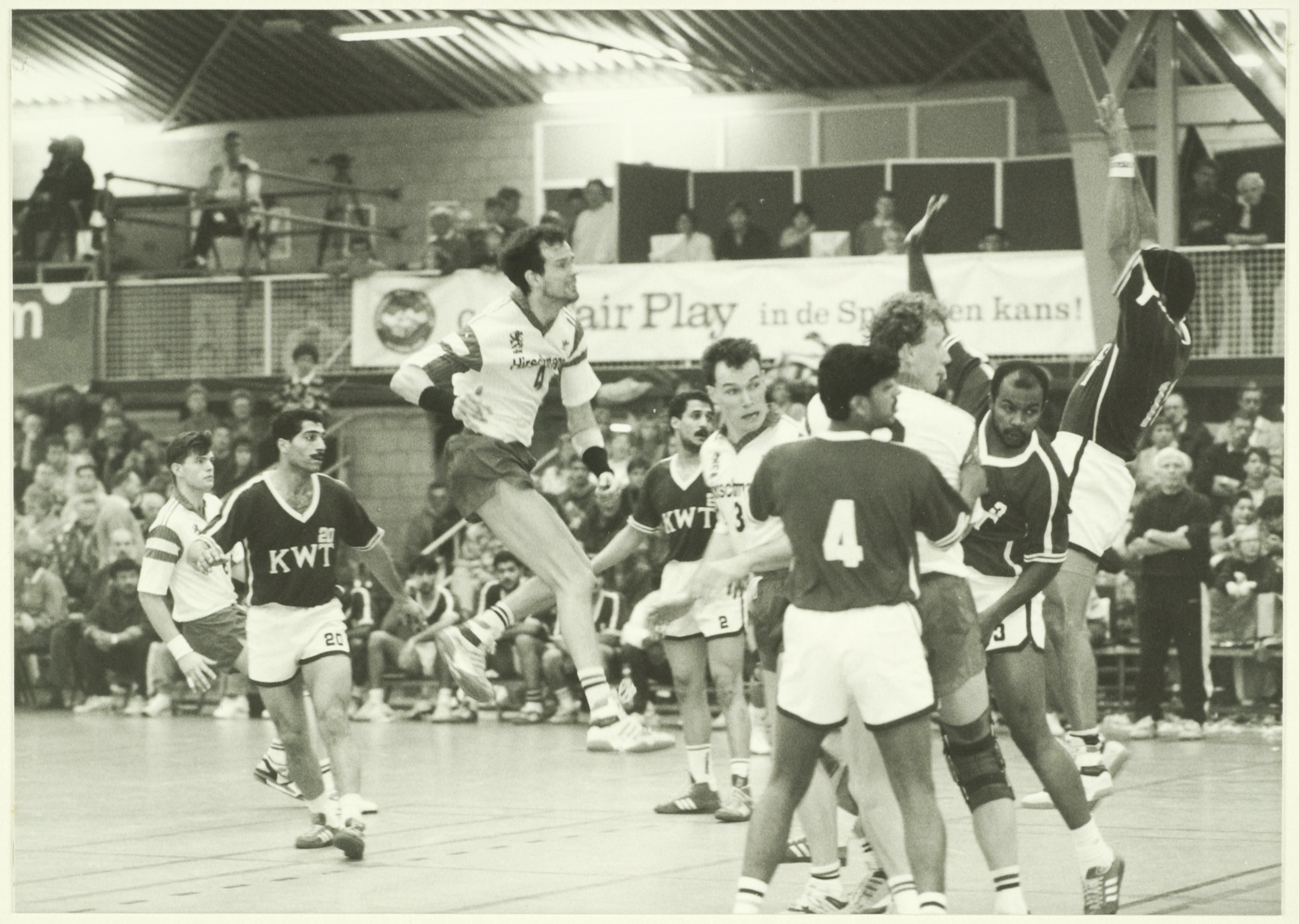 CollectieCollectie Fotoburo de BoerInventarisnummerNL-HlmNHA_5400465501BeschrijvingImbema Sportcenter, Haarlemse Handbalweek. Handbalwedstrijd Nederland-Kuwayt: 18-13.FotonummerNL-HlmNHA_5400465501DocumenttypeHistorieprenten, tekeningen en foto'sVervaardigerBoer, Poppe de Soort vervaardigerFotograaf AnnotatiesHD.02129135502k9LandNederland ProvincieNoord-Holland GemeenteHaarlem PlaatsHaarlem Begindatum1991Einddatum1991TechniekFoto Trefwoordensport en recreatie Plaatsinggb49